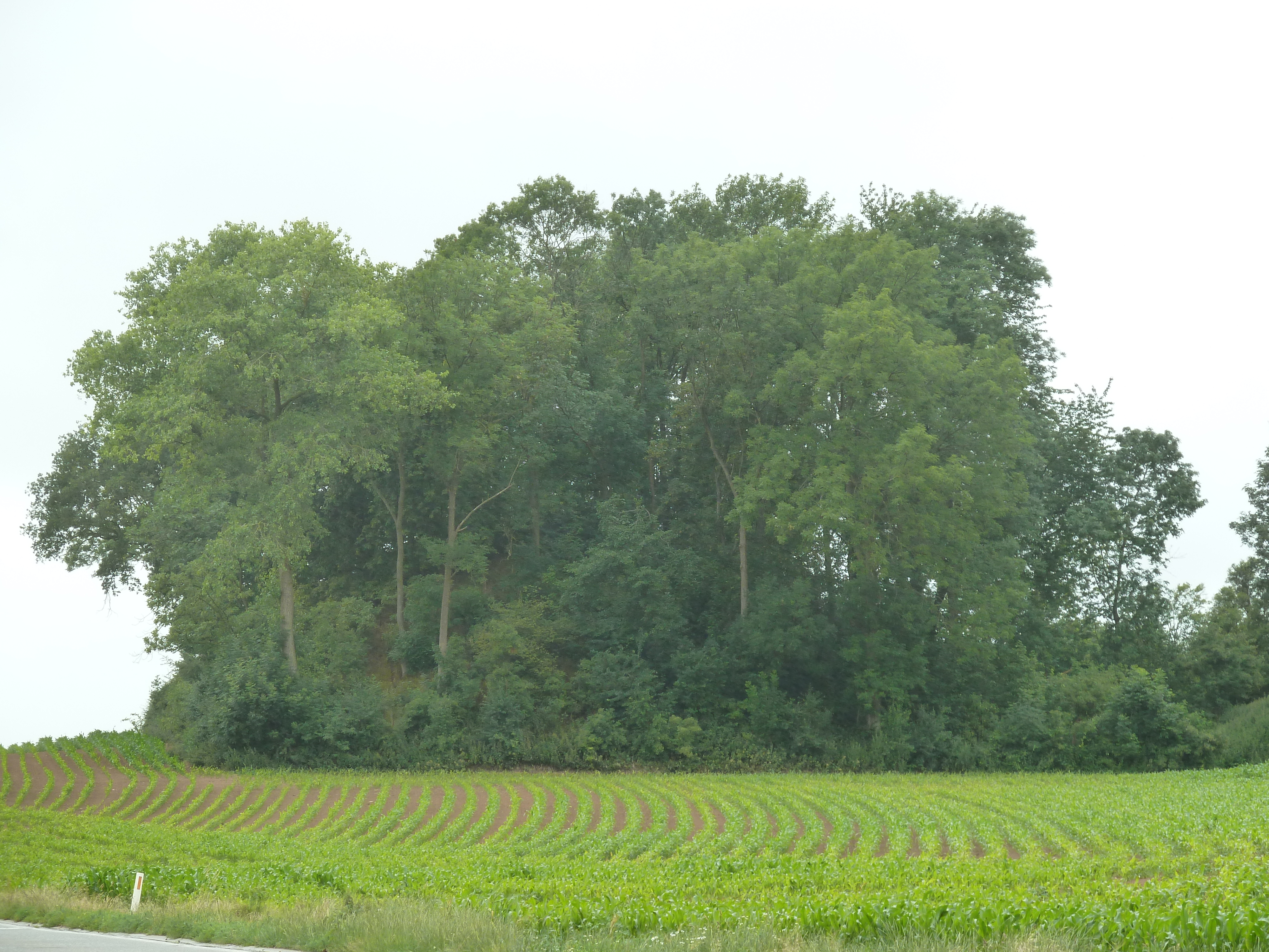 Tumuli du Soleil, Ambresin, Wasseiges, Belgique